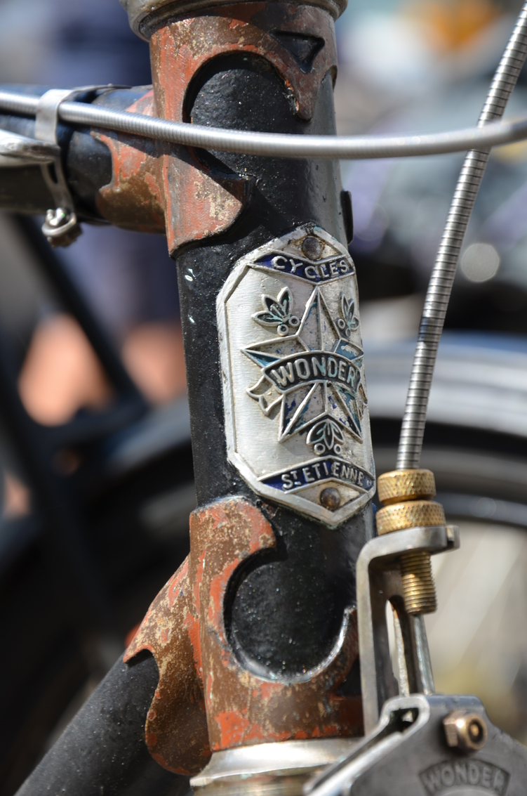 Écusson des Cycles Wonder de Saint-Etienne.